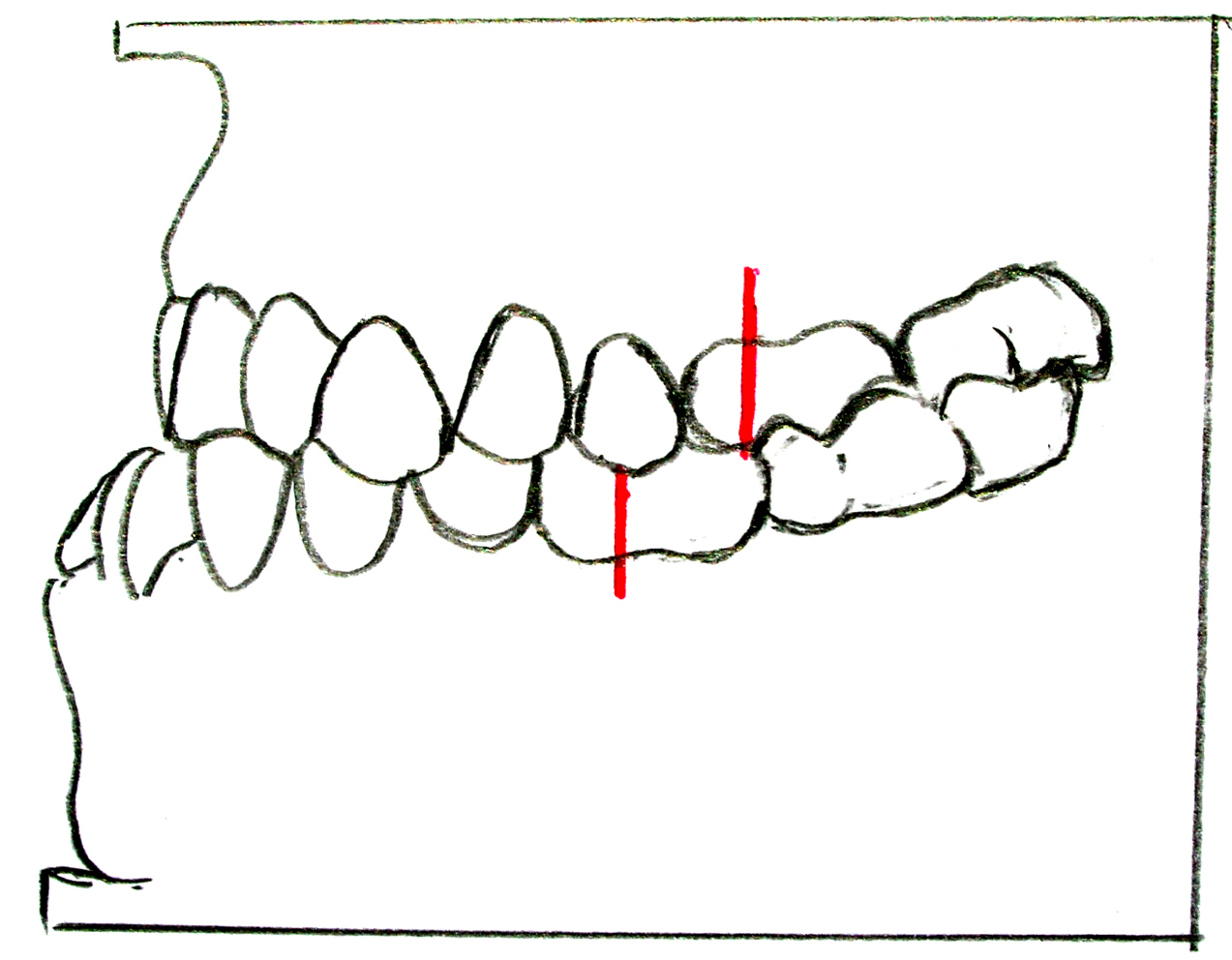 Zahnbeiehungen nach Angle Klasse III